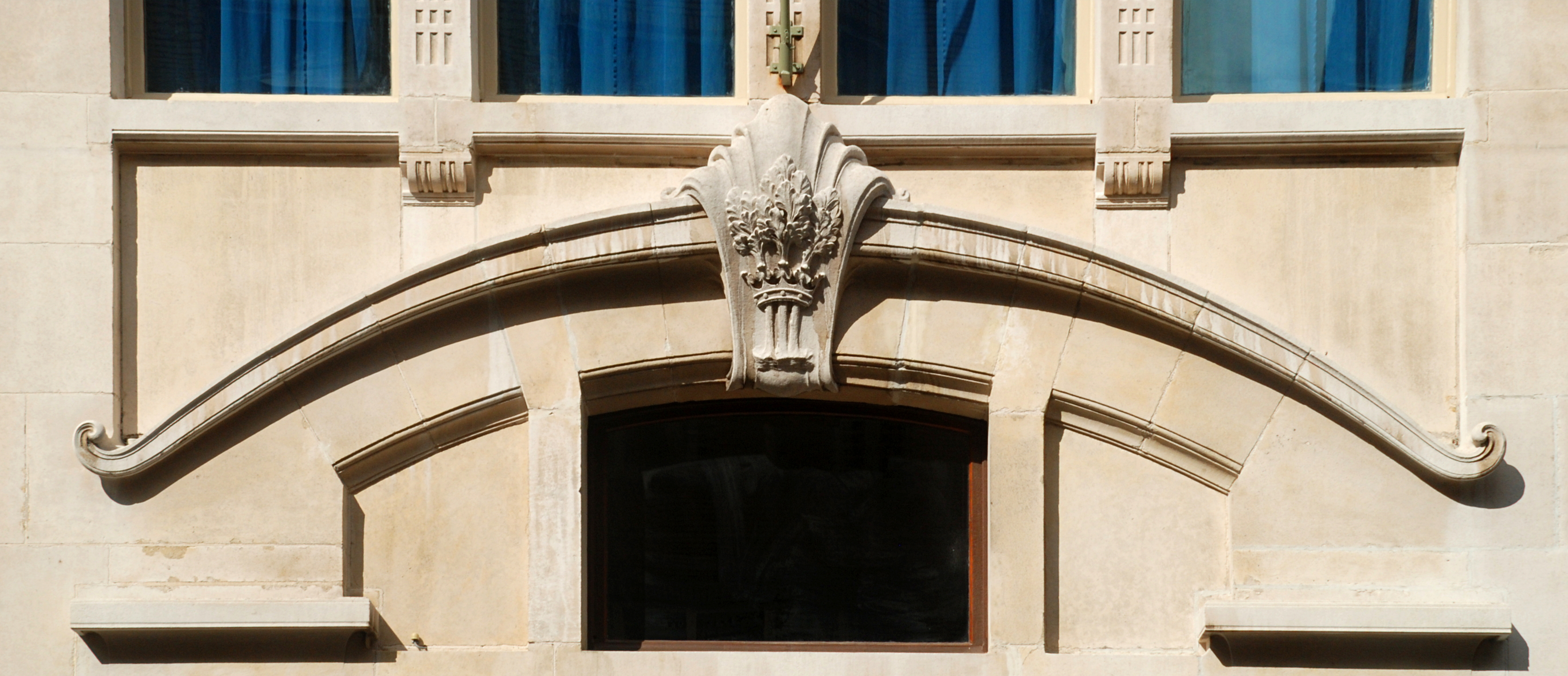 Belgique - Bruxelles - École Rodenbach (Art nouveau - architecte Henri Jacobs - 1905-1911)